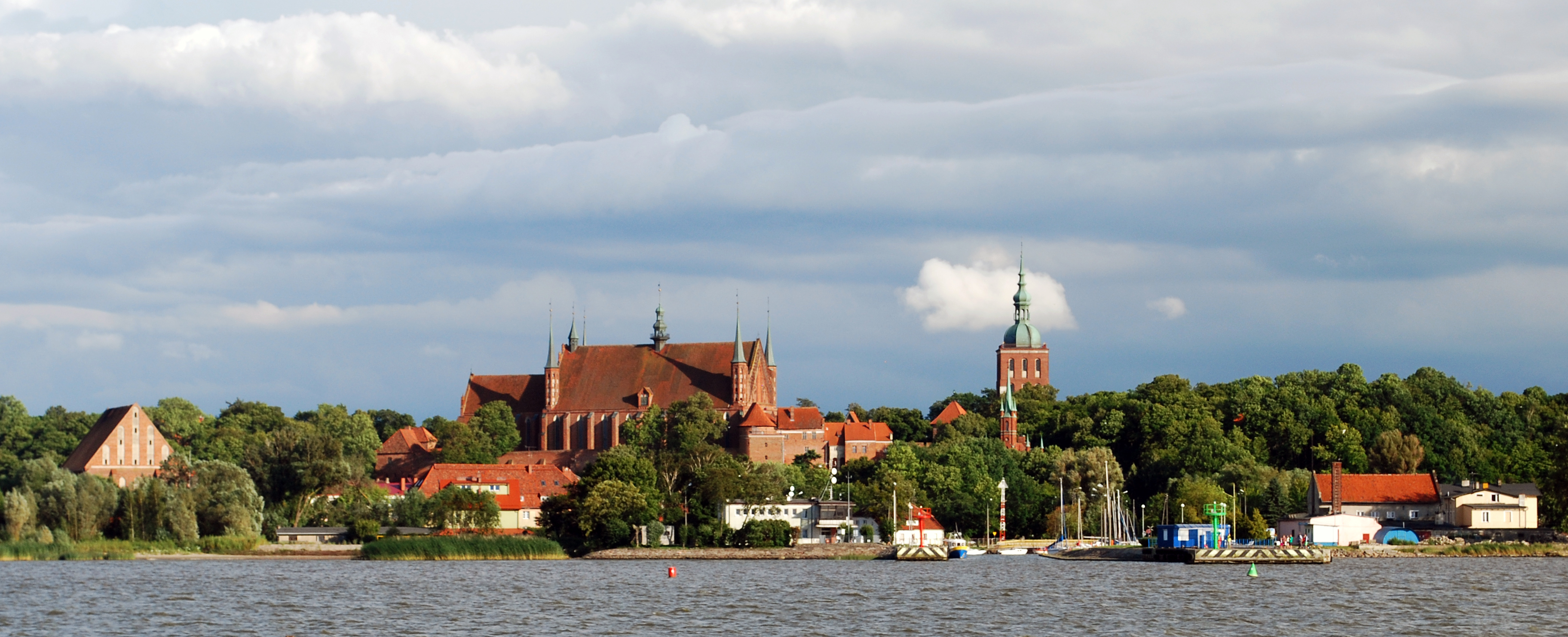 Panorama Fromborka ze statku Anita